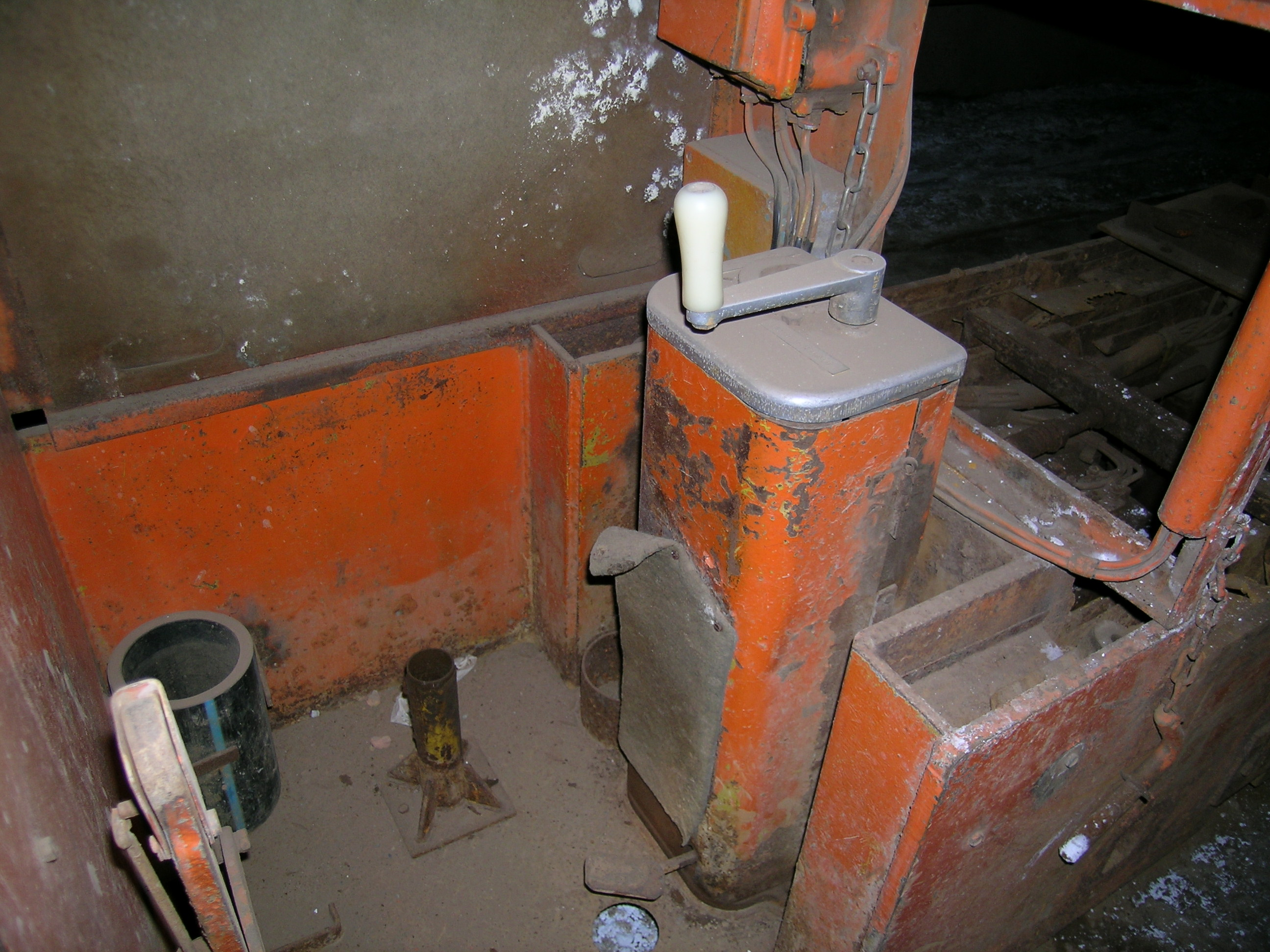 Fahrschalter einer BBA B 360.